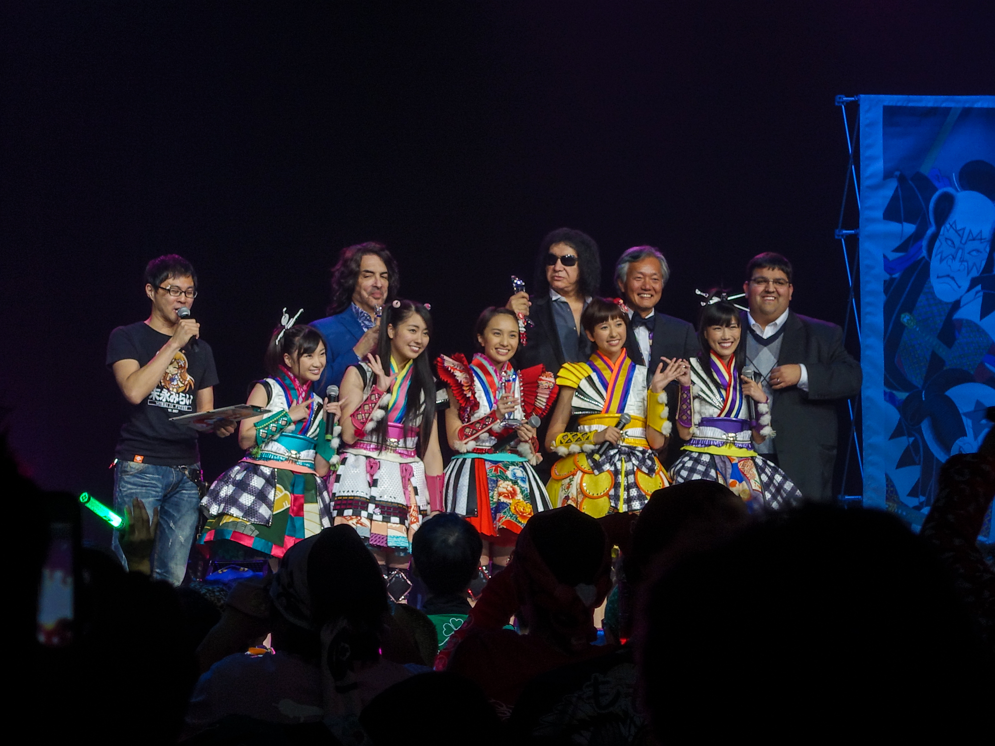 Momoiro Clover Z